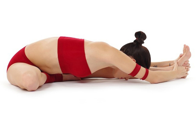 Janusirsasana by Nina Mel, Yoga Teacher